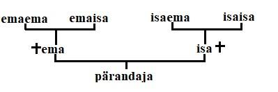 pärandajal pole ühtegi esimese järjekorra (alanejaid sugulasi) ega teise järjekorra (vanemad ja nende alanejad sugulased) pärijaid. Seega pärivad pärandaja emaema, emaisa, isaema ning isaisa (pärimise järjekorra põhimõte). Kõik pärivad võrdsetes osades, järelikult on kõigi osa suuruseks ¼.